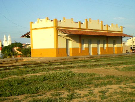 Antiga Estação Ferroviaria na cidade construída no governo provisório de 1932. Reformada na administração da prefeita Yasnaia Pollyanna Werton Feitosa no ano de 2009. Pelo SEMCET (Secretaria Municipal de Cultura, Esporte e Turismo) com o secretário: Paulo Romero Oliveira Freitas.